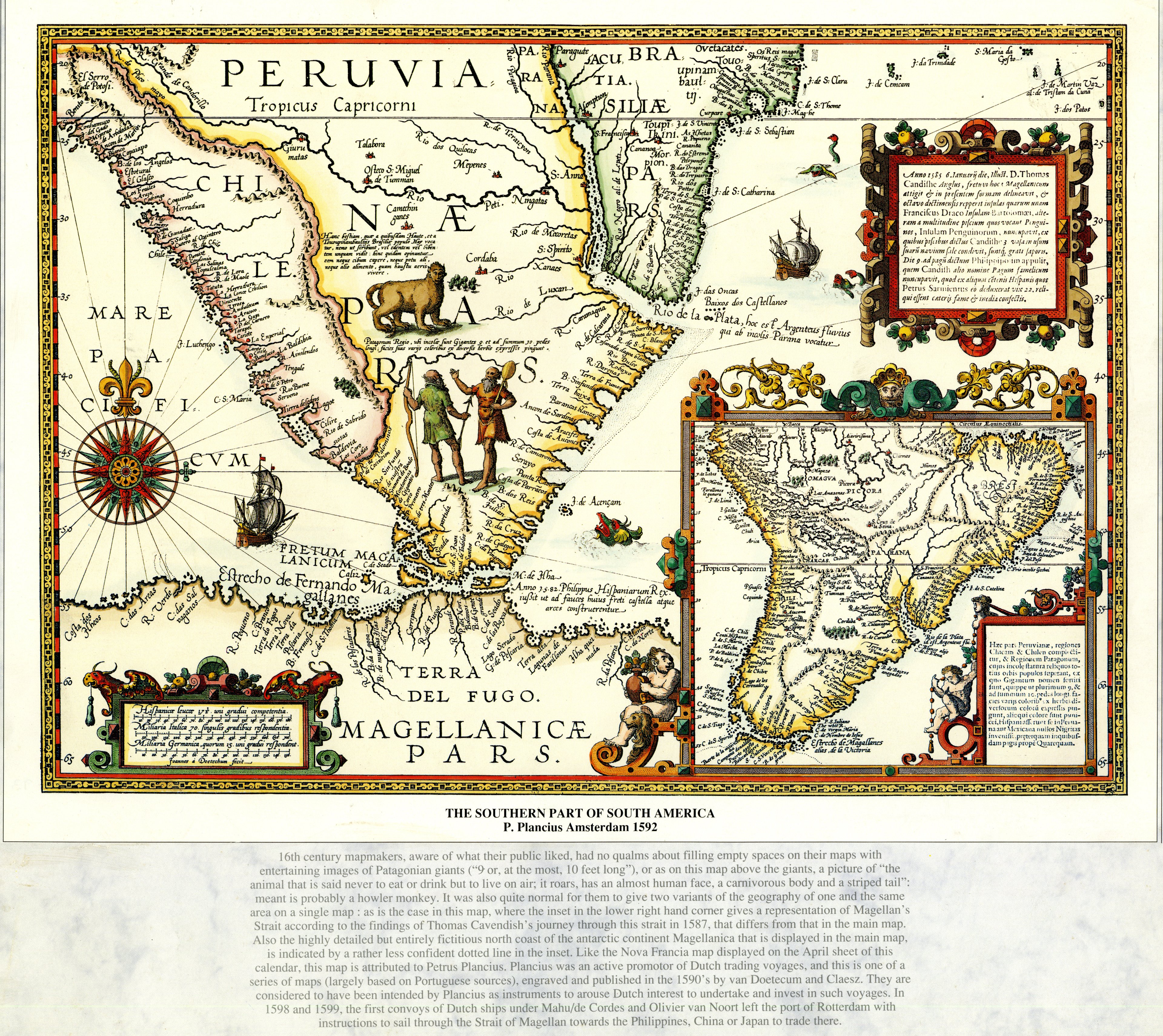 Diapositiva de Consulta y acceso publico cuya información fue investigada de un libro y/o ejemplar de revisión custodiado en los Fondos Bibliográficos y Cartográfico (Sección Siglo XVI o Etapa Colonial) del Archivo Histórico del Guayas; Guayaquil, Ecuador.Compartido y consultado usuario J. Javier García A.